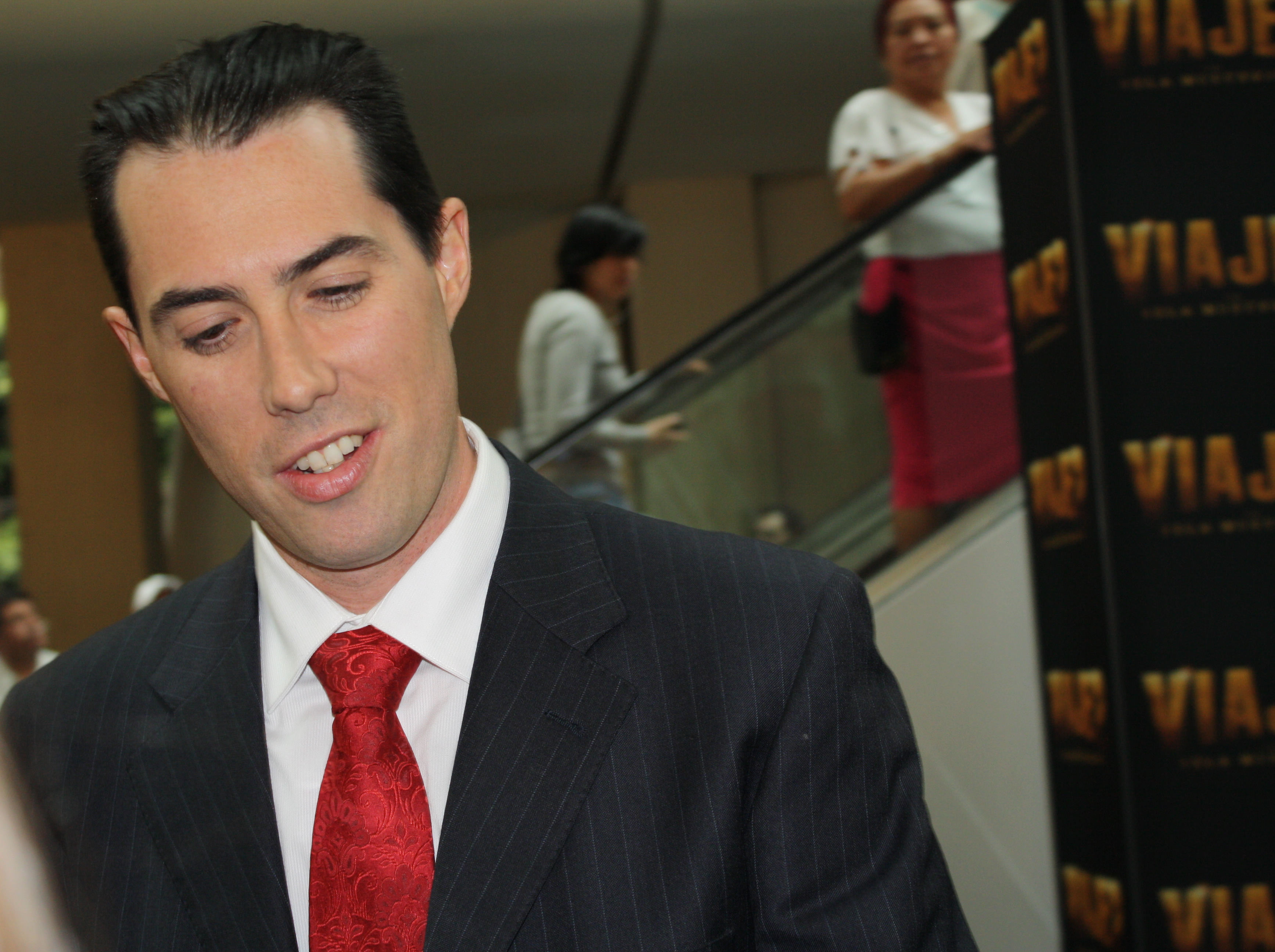 Brad Peyton durante la alfombra roja de Viaje 2 en Reforma 222 México D.F.